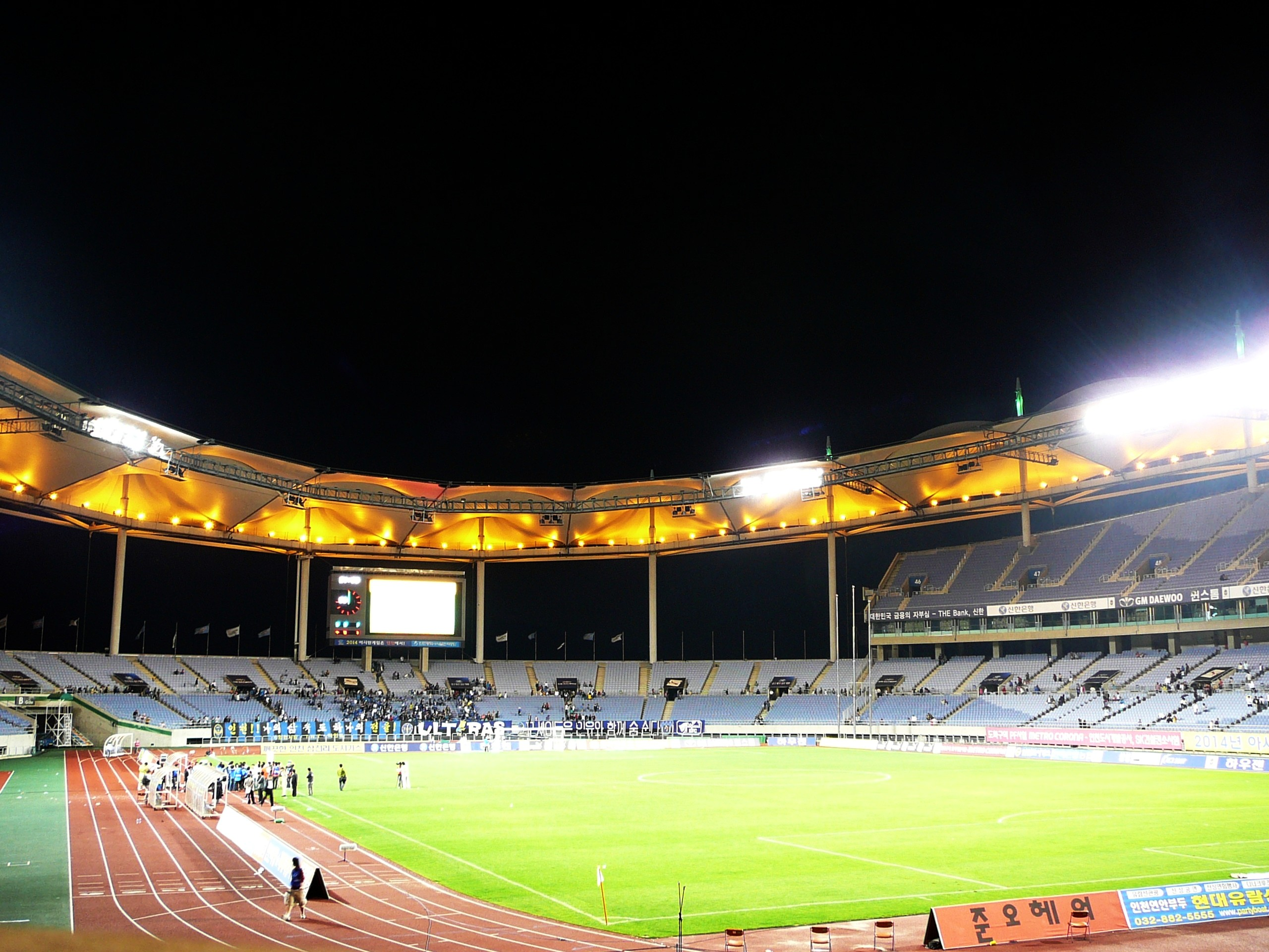 분류:건축물 그림 분류:축구 그림